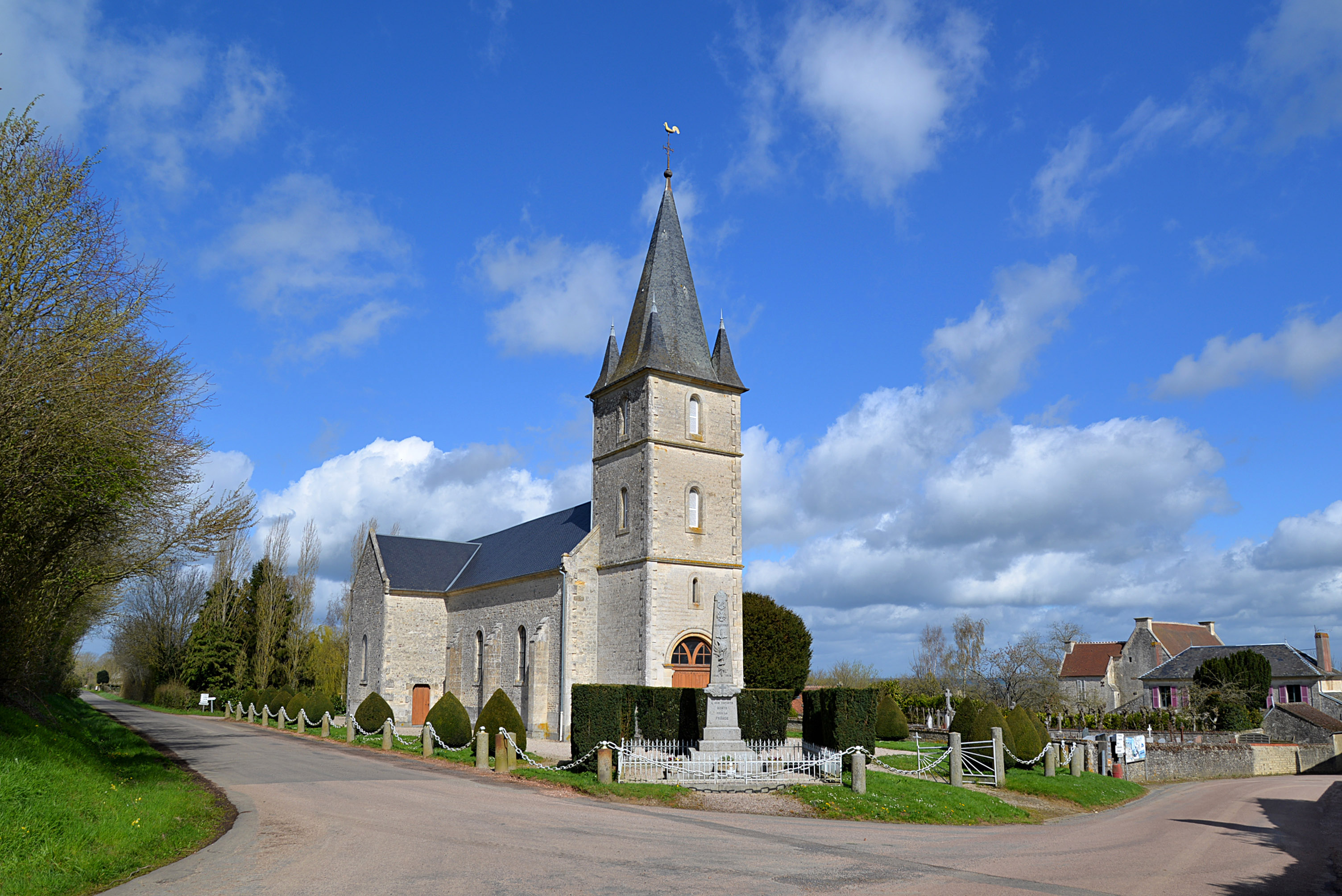 Champcerie (Orne)